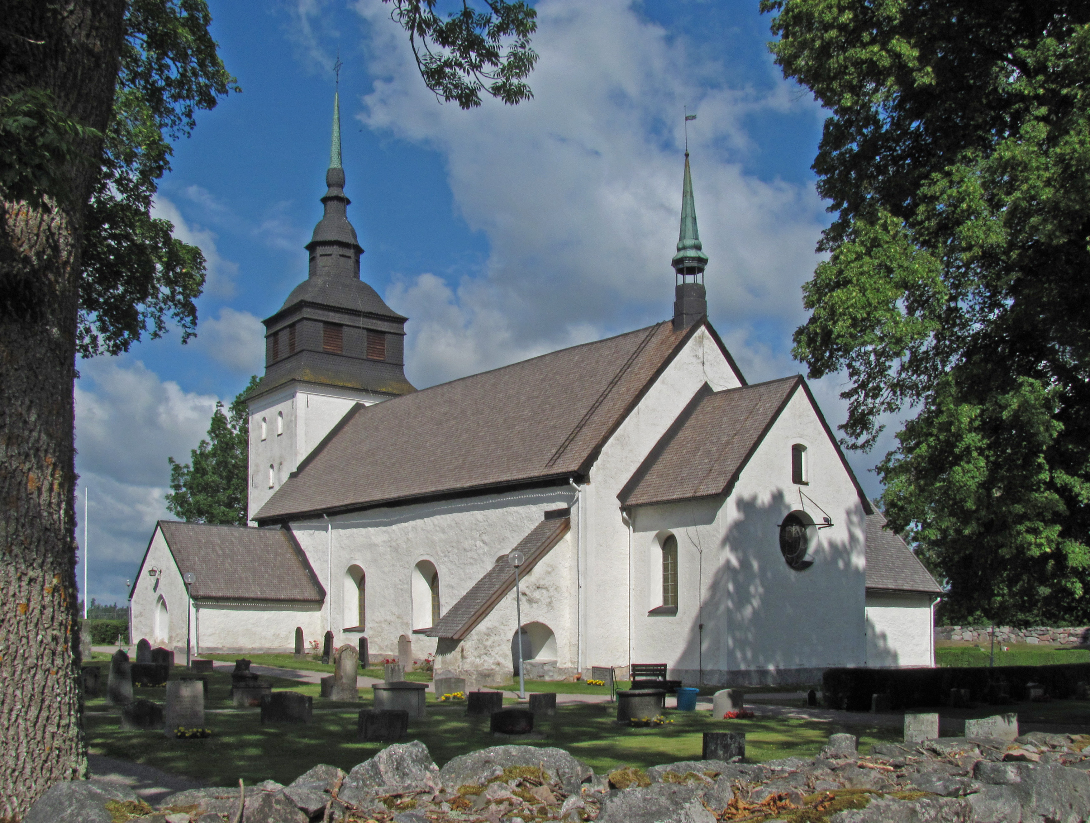 Vansö kyrka